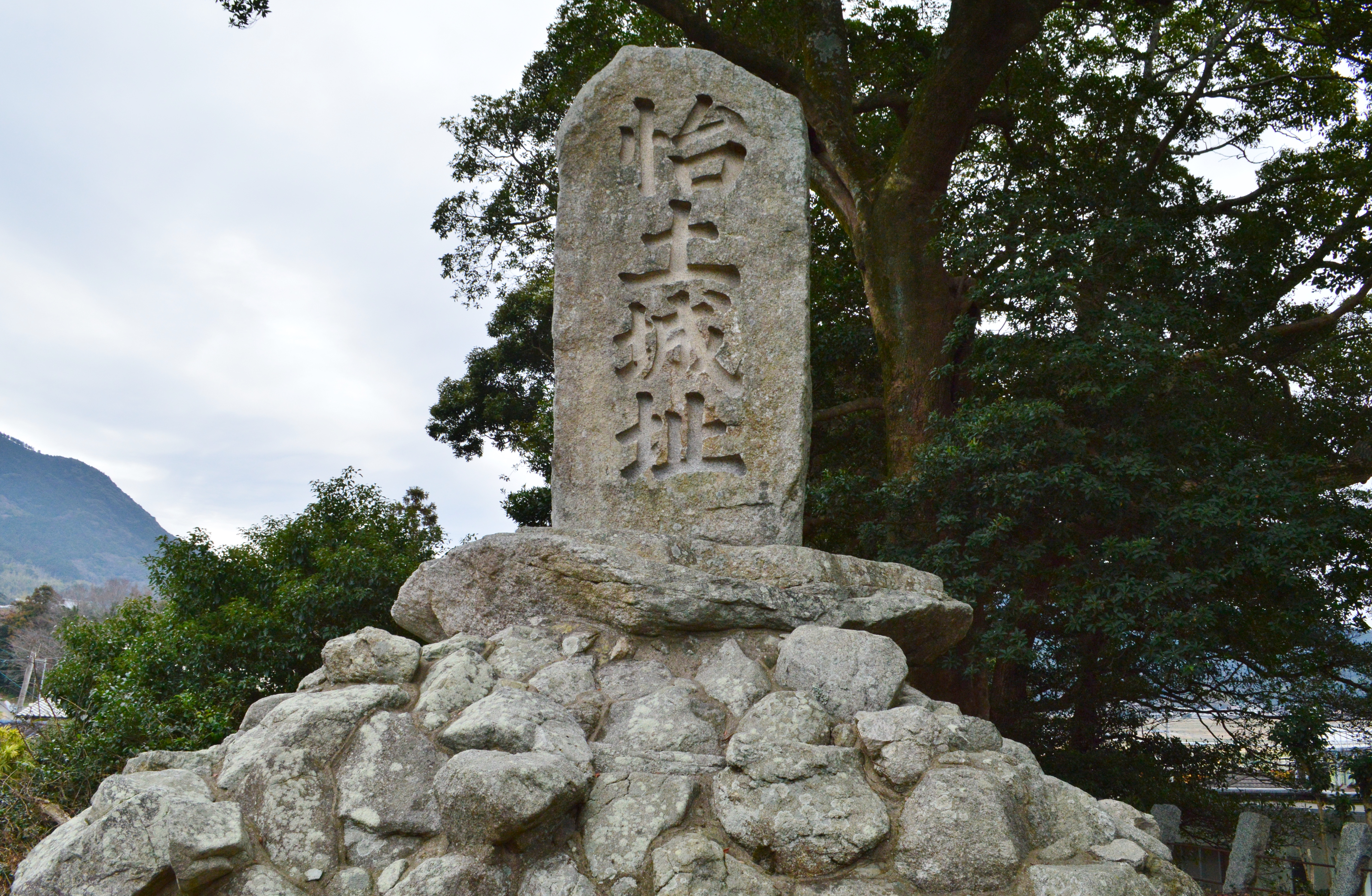 怡土城 大鳥居口の石碑